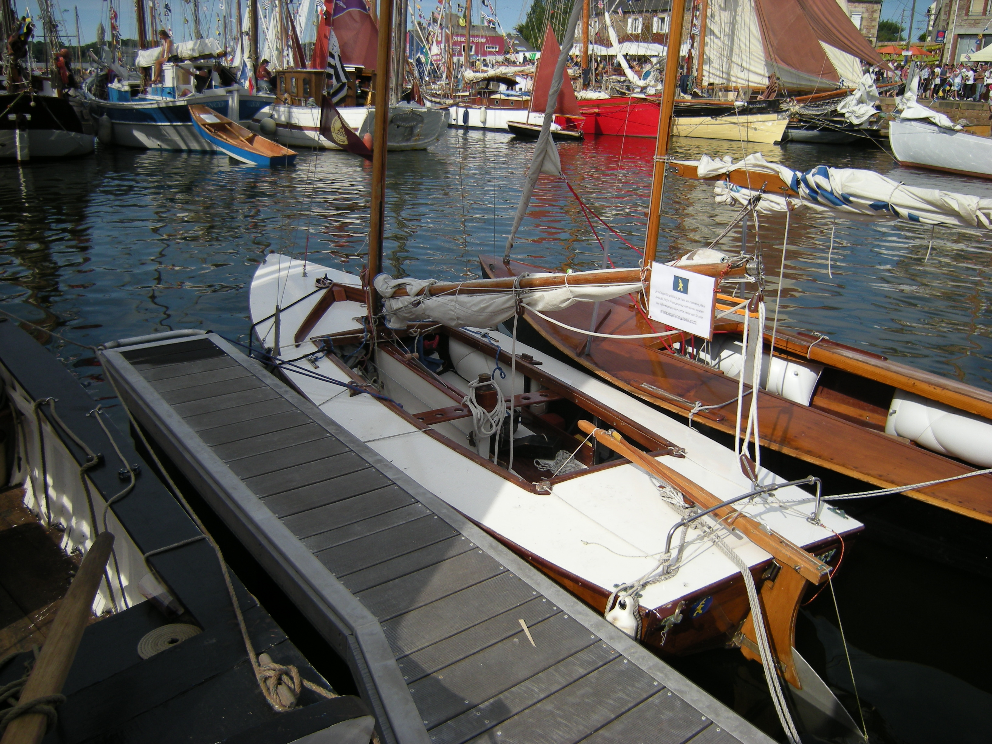 Canetons Brix au Category:Festival du chant de marin. Paimpol 2009